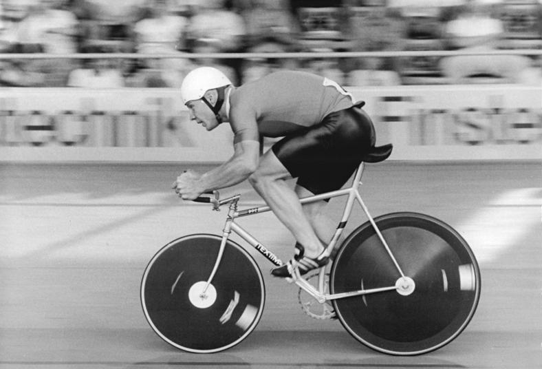 Jens Glücklich ADN-ZB Weisflog 22.6.89 Cottbus: 41. DDR-Meisterschaften im Bahnradsport - Zum Auftakt der Meisterschaften stellte der 23-jährige Jens Glücklich (SC Cottbus) am 21.6. mit 1:04,19 min im 1.000-m-Zeitfahren einen neuen DDR-Rekord auf.